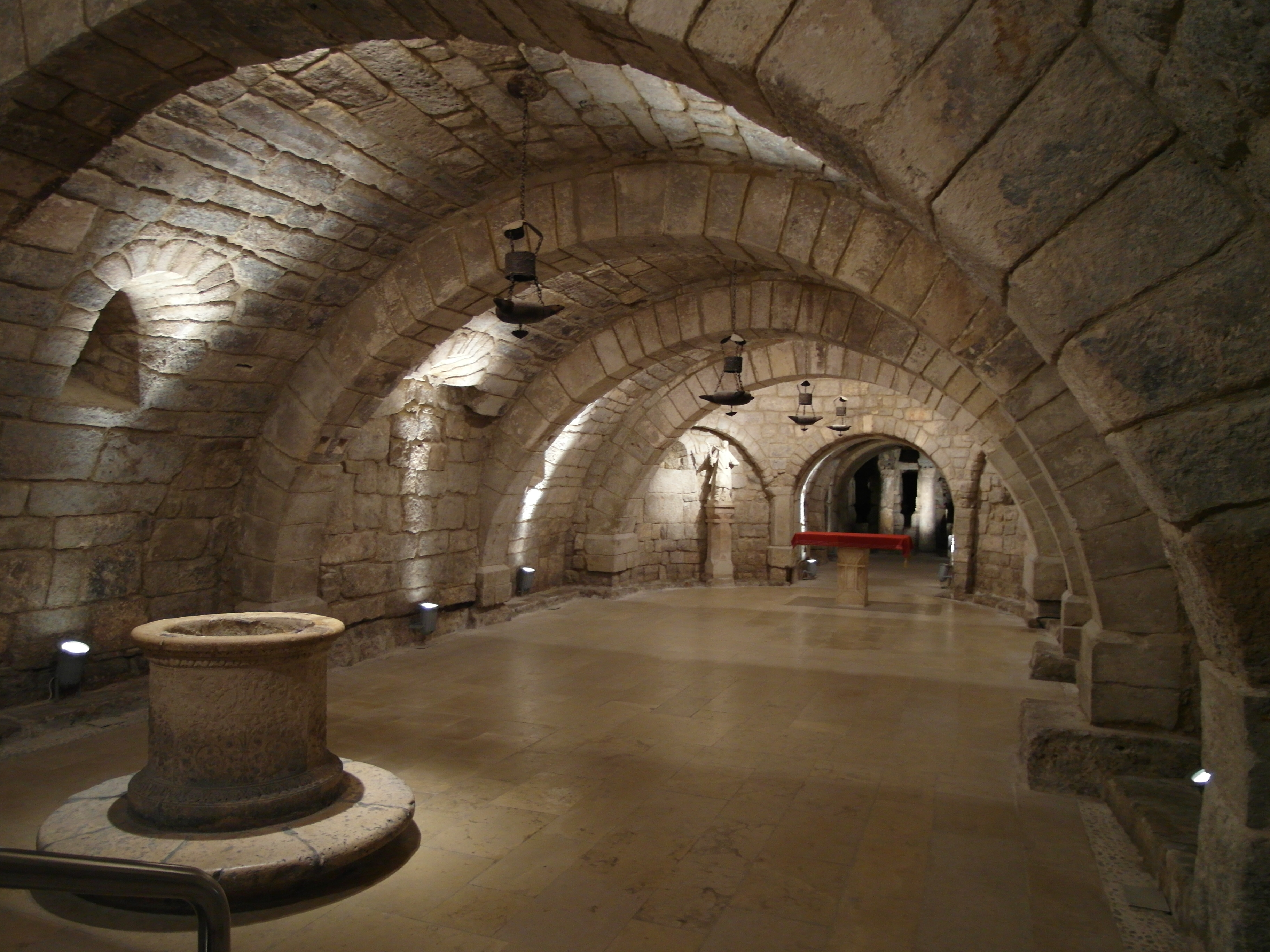 Catedral de Palencia, Palencia.